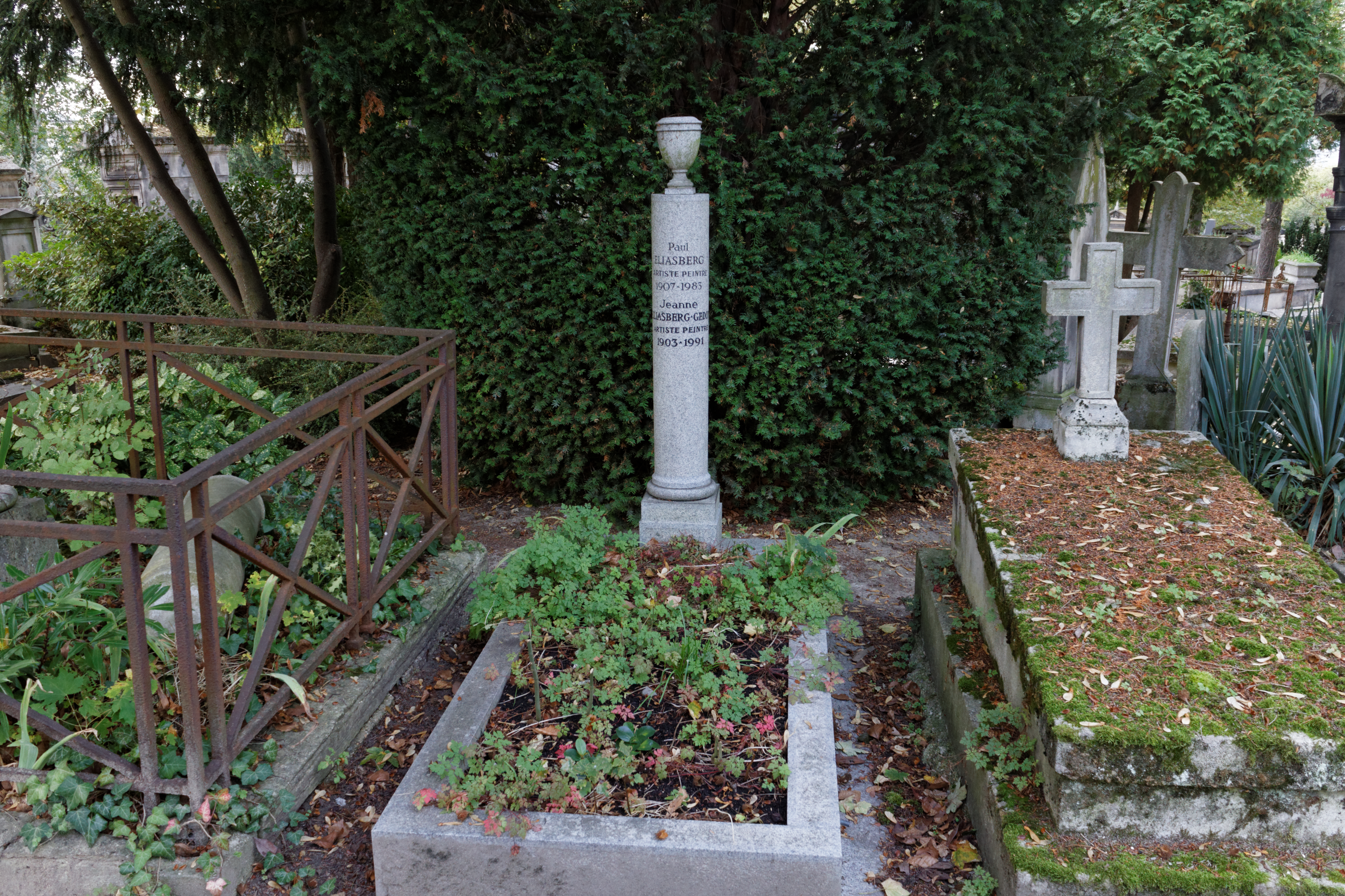 Colonne